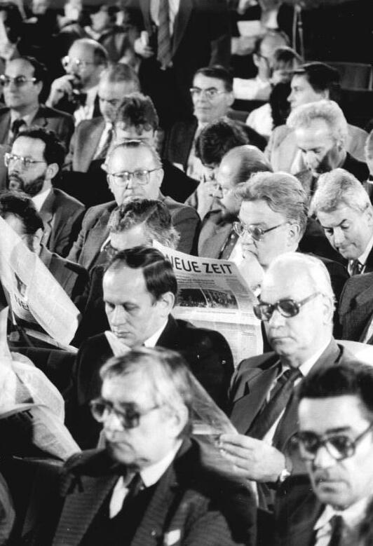 ADN-ZB Reiche-16.12.89-fd-Berlin: CDU-Sonderparteitag - Die Delegierten des Sonderparteitages der CDU setzten ihre Beratungen unter dem Motto "Erneuerung und Zukunft" fort. Die Tageszeitung der Union war in den Pausen beliebteste Lektüre."